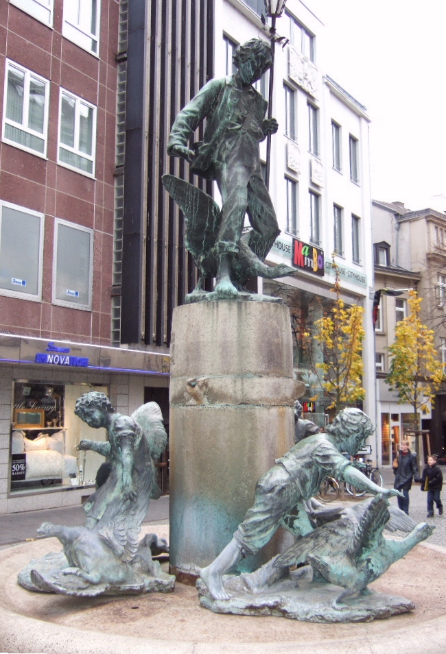 Heinrich Goetschmann: Martinsbrunnen (1902) Im Zweiten Weltkrieg wurden die Figuren eingeschmolzen und 1958 nach alten Gipsformen von Ingeborg von Rath wiedergeschaffen. Material: Bronze Ort: Bonn – In der Sürst (vor dem Westportal des Bonner Münsters)